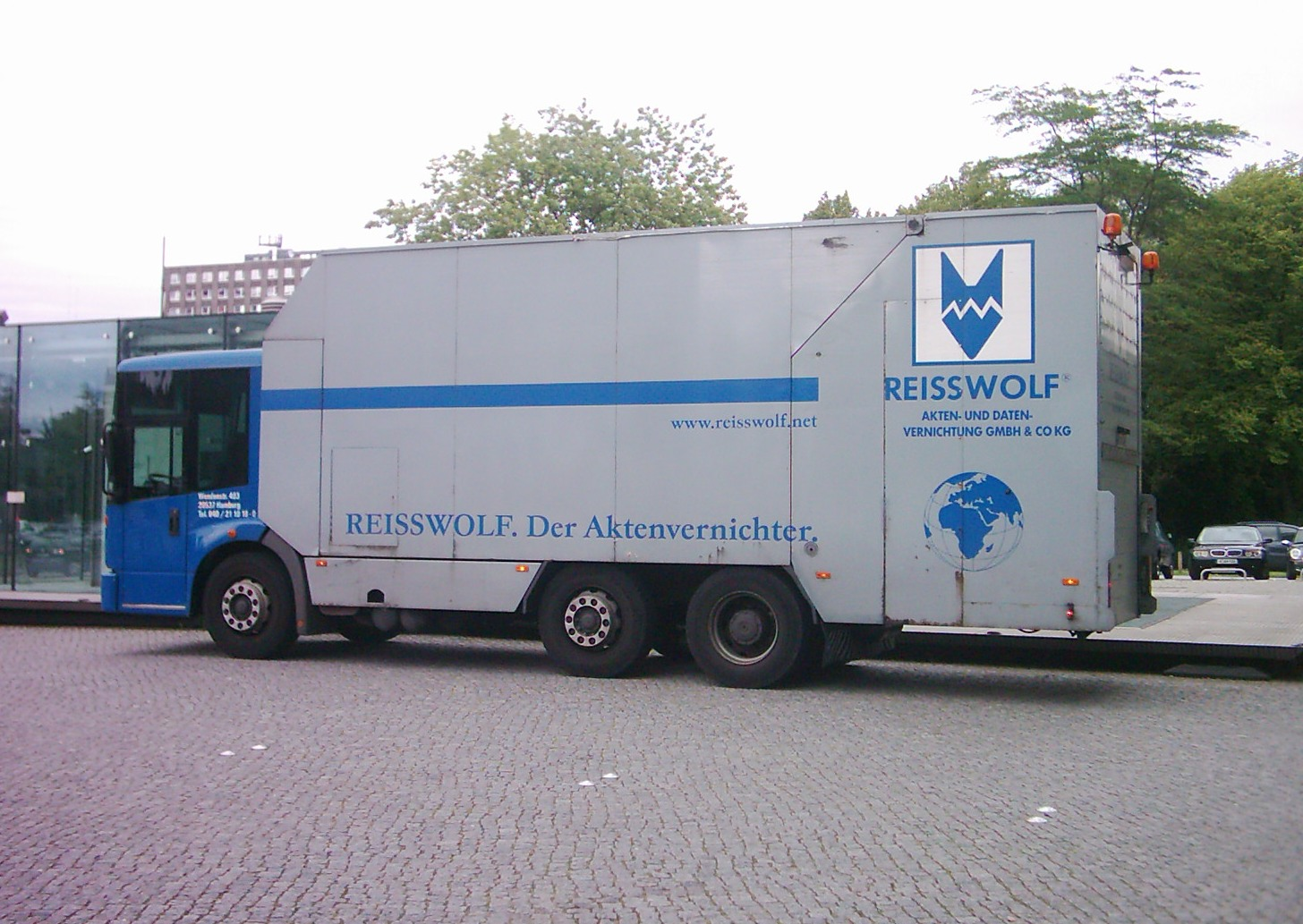 Aktenvernichtungs-LKW der Firma Reisswolf.